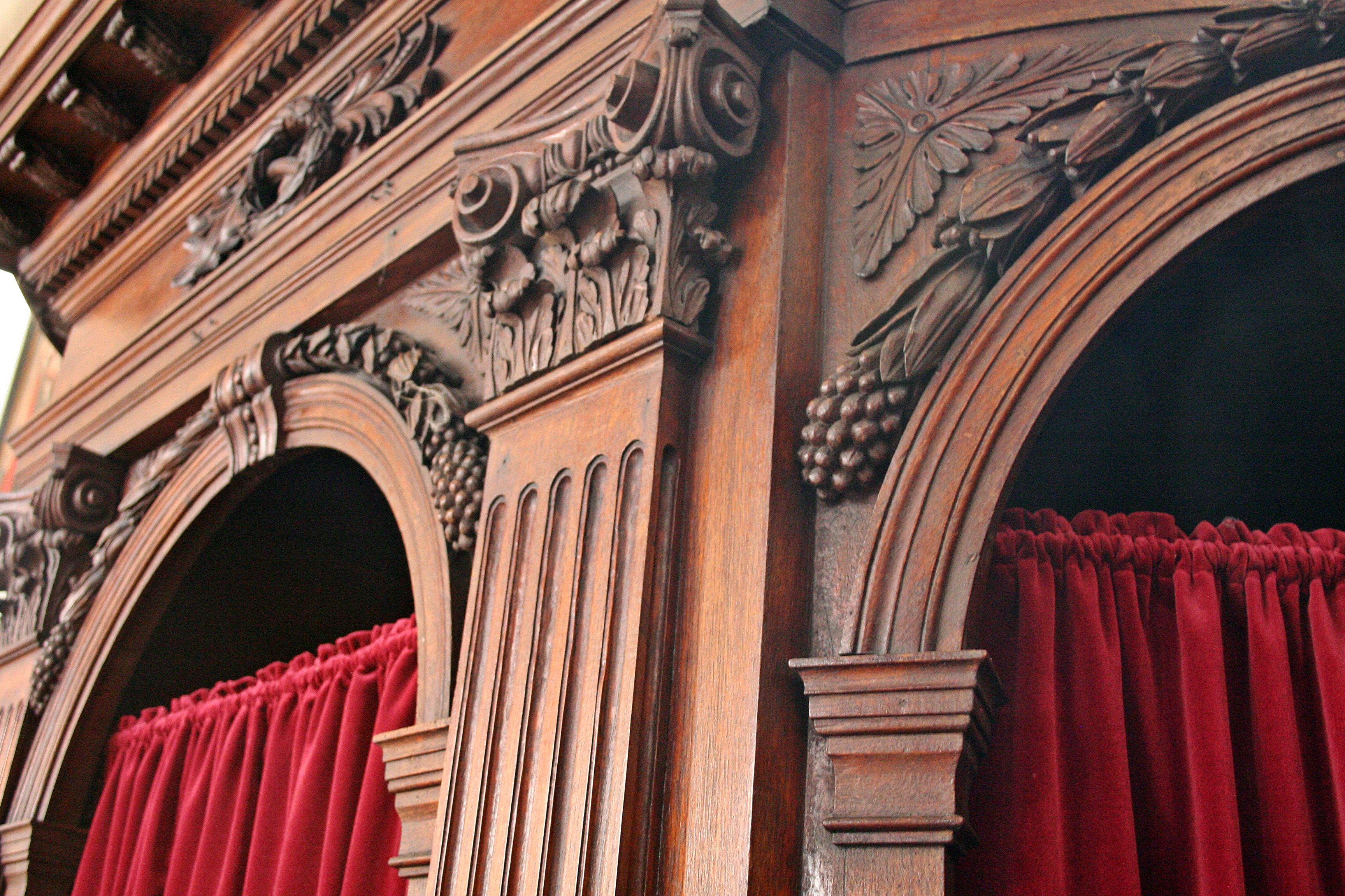 Detail van een biechtstoel in de Sint-Pieterskerk (Langdorp)